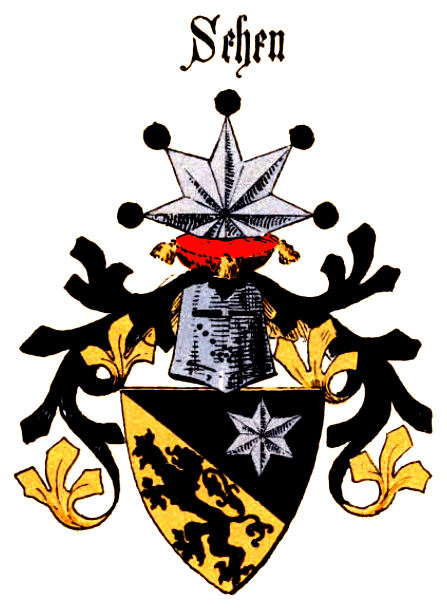 Wappen der von Sehaim (Sehen)